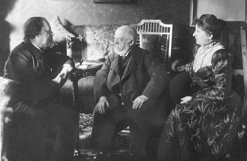 München, Adolph von Menzel und Paul Heyse ADN-ZB/Archiv Adolph von Menzel, Maler, Graphiker und Zeichner (Mitte) mit dem Schriftsteller Paul Heyse und dessen Frau in deren Münchener Wohnung Aufnahme 1902 Abgebildete Personen: Menzel, Adolph von: Maler, Grafiker, Zeichner, Deutschland (PND 118580914) Heyse, Paul von: Dichter, Schriftsteller, Deutschland